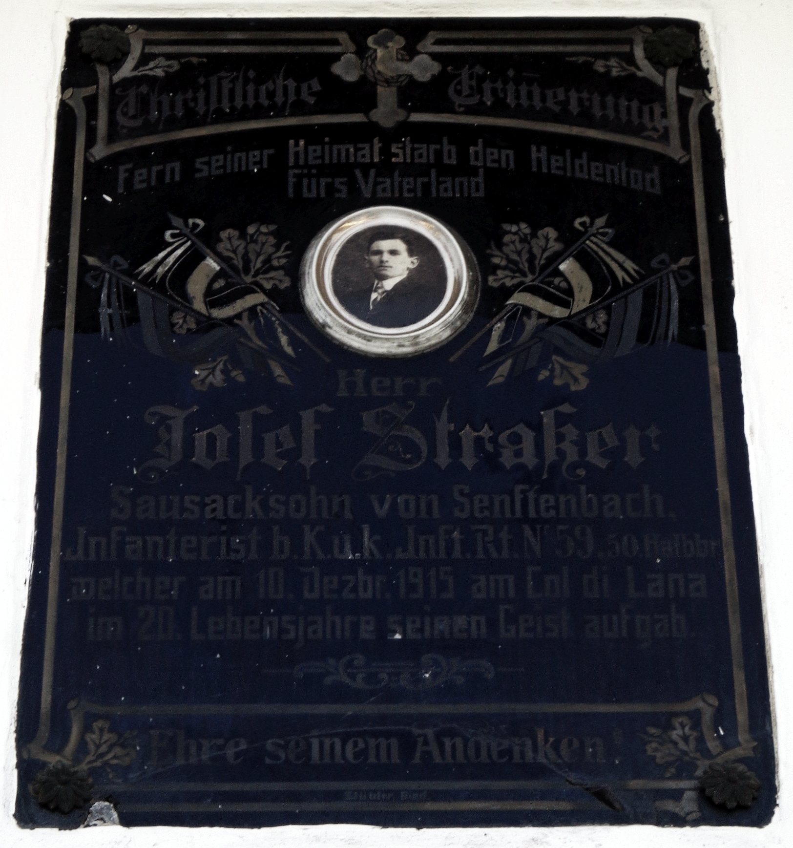 Pfarrkirche Senftenbach - Gedenktafel im alten Friedhof an Josef Straßer, Soldat im k.u.k. Infanterieregiment Nr. 59 "Erzherzog Rainer", gefallen am 10. Dezember 1915 am Col di Lana